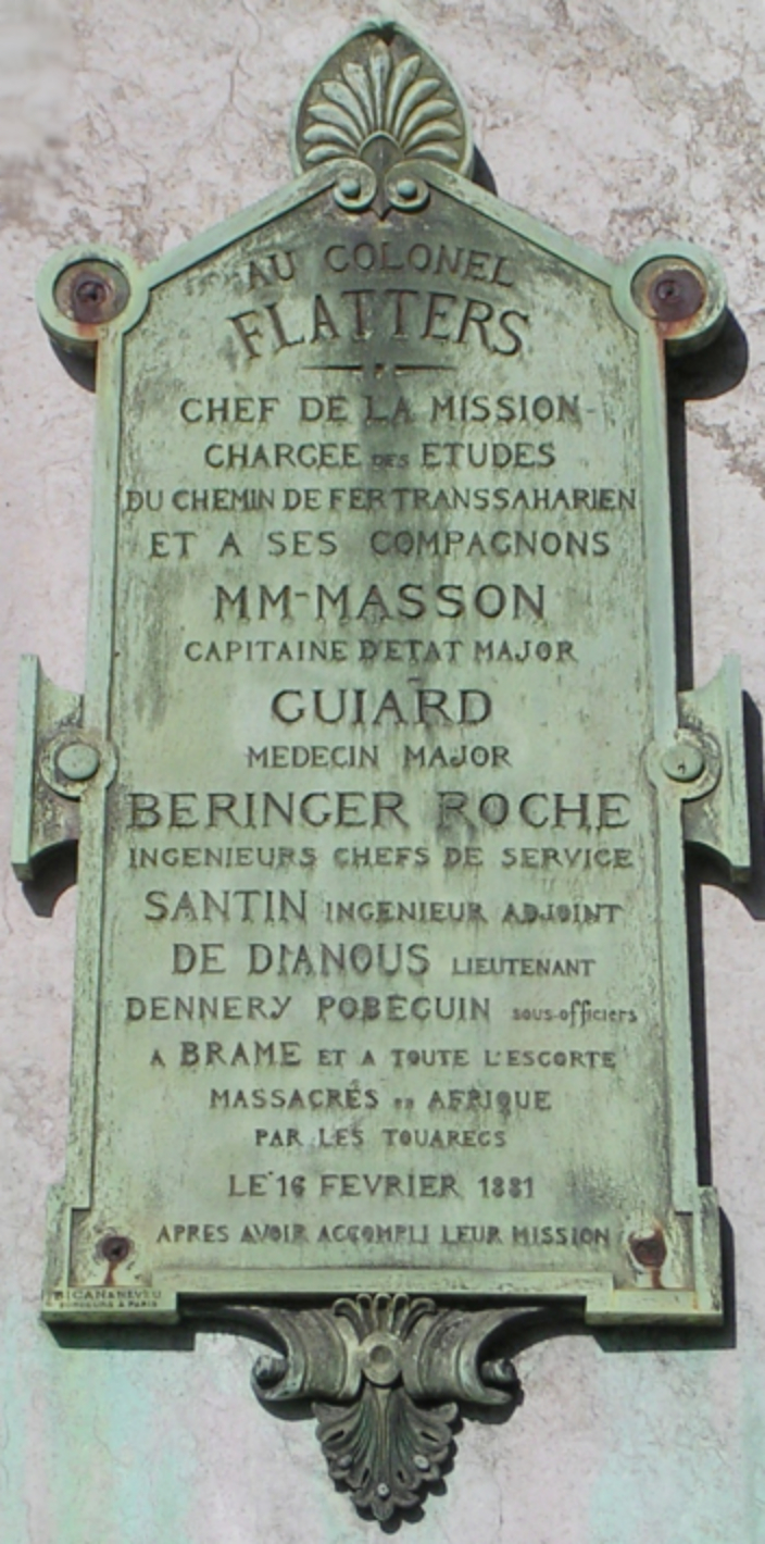 Détail du monument commémoratif à la mission Flatters au parc Montsouris, Paris, France. Inscription: Au colonel FLATTERS, chef de la mission chargée des études du chemin de fer transsaharien et à ses compagnons, MM-MASSON capitaine d'état major, GUIARD medecin major, BERINGER ROCHE ingeneurs chefs de service, SANTINI ingénieur adjoint, DE DIANOU lieutenant, DENNERY POBECUIN sous-officiers à BRAME et à toute l'escorte massacrés en Afrique par les Touaregs le 16 février 1881 après avoir accompli leur mission.